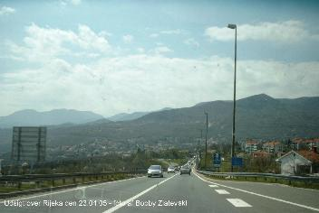 Entering Rijeka on 23.04.2005.